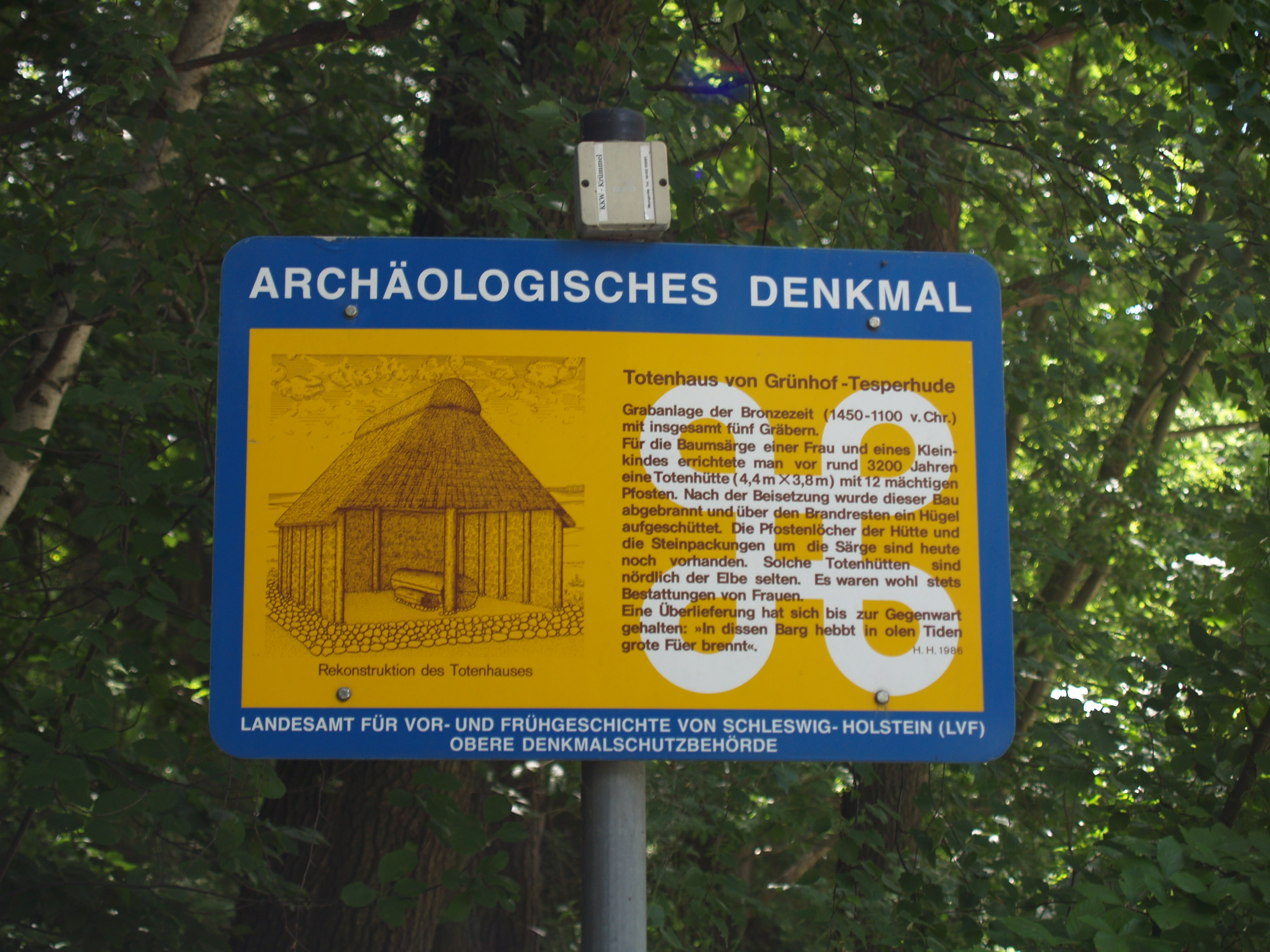 Hinweistafel Totenhaus von Tesperhude, Schleswig-Holstein, Deutschland